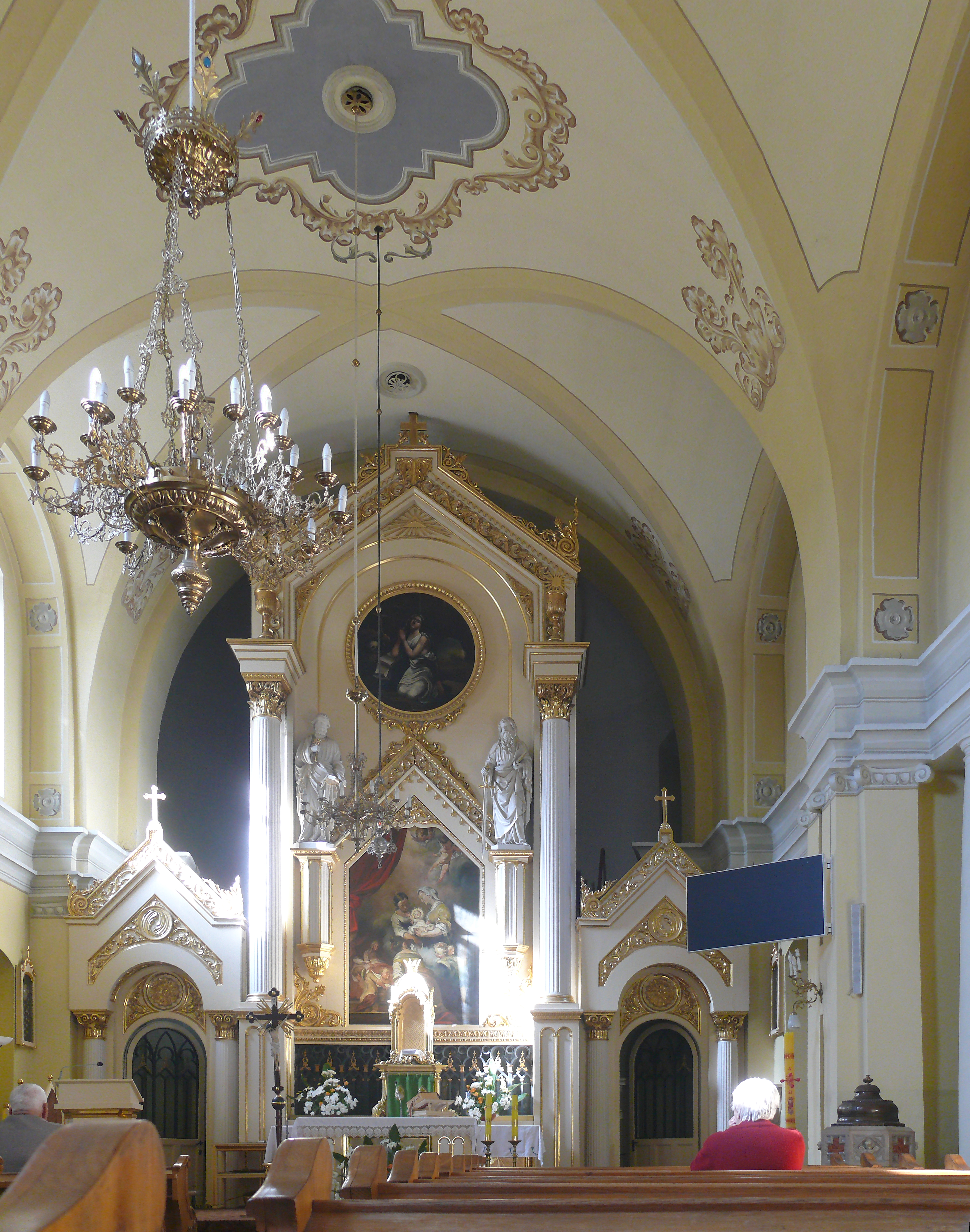 widok na ołtarz główny kościoła parafialnego w Narolu, woj. podkarpackie